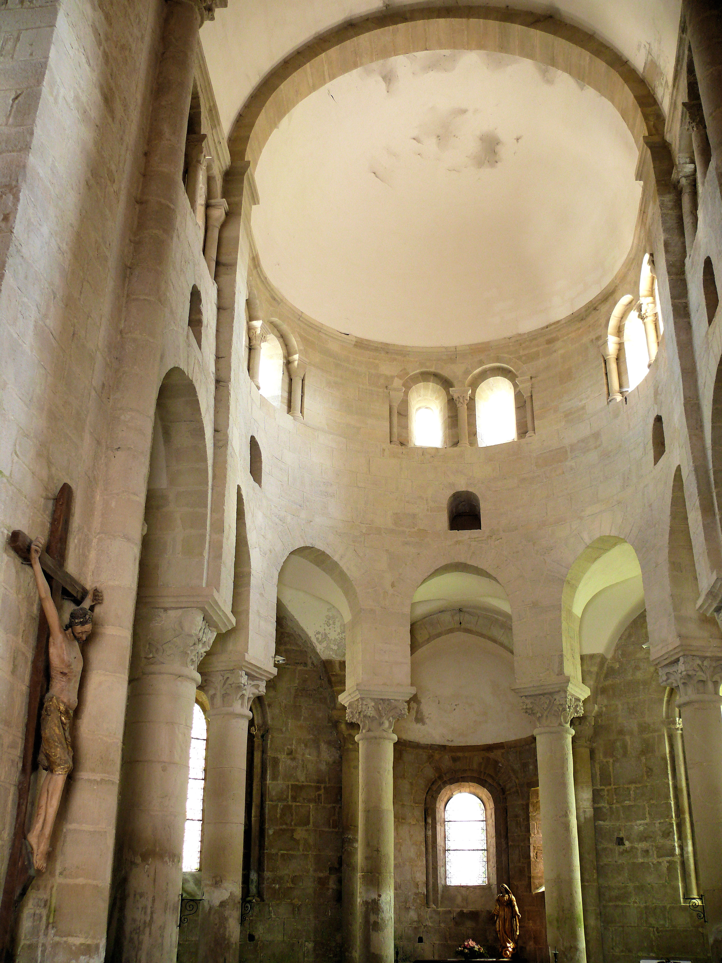 Saint-Robert - Eglise Saint-Robert - Choeur